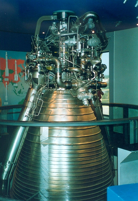 Moteur Vulcain 1 qui assure la propulsion de l'étage principal du lanceur Ariane 5, Cité de l'Espace de Toulouse.